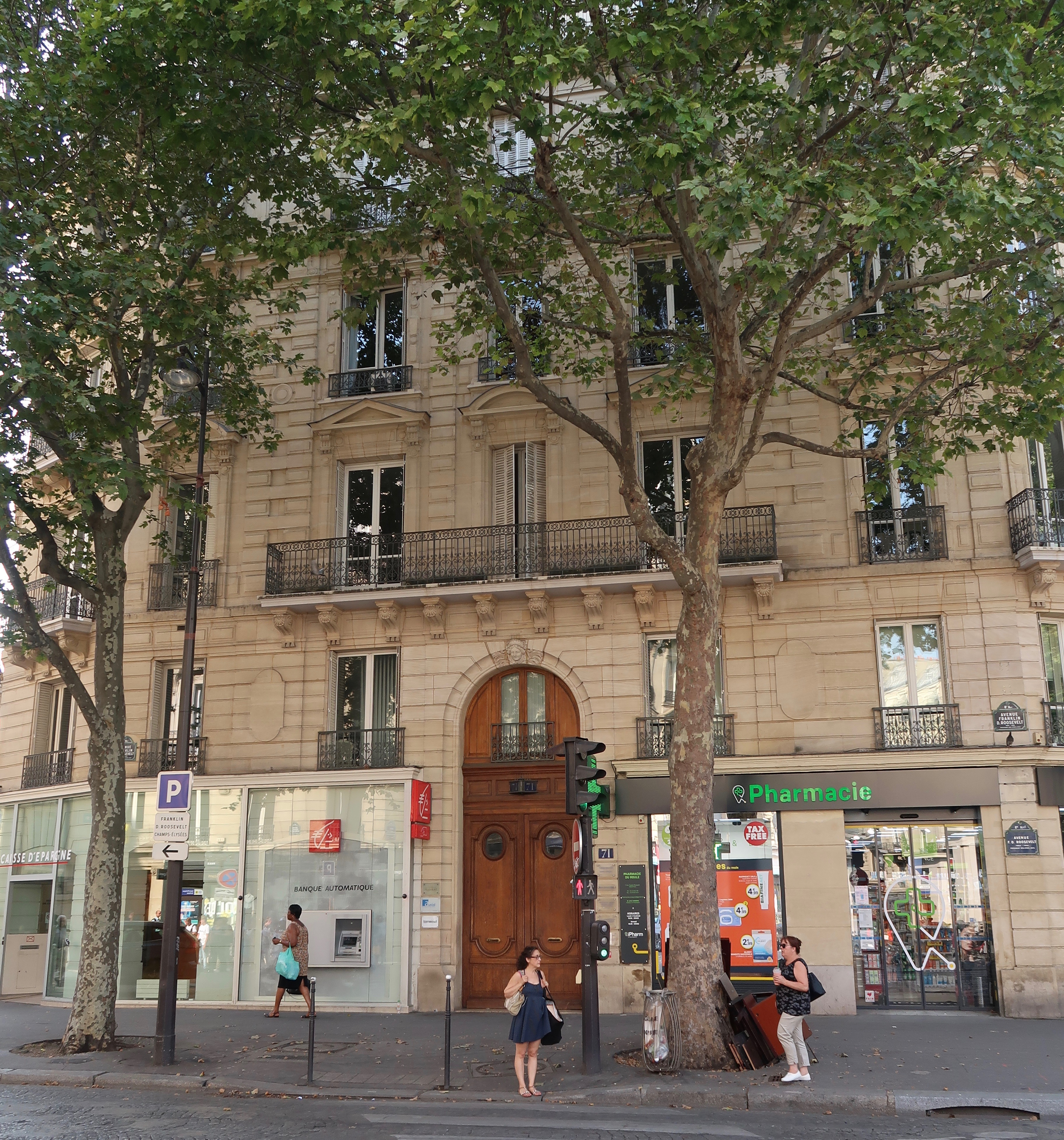 71 avenue Franklin-D.-Roosevelt (Paris, 8e).